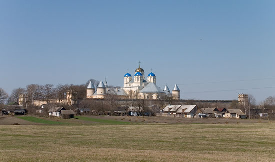 Межиріч, Острозький район, Рівненська область